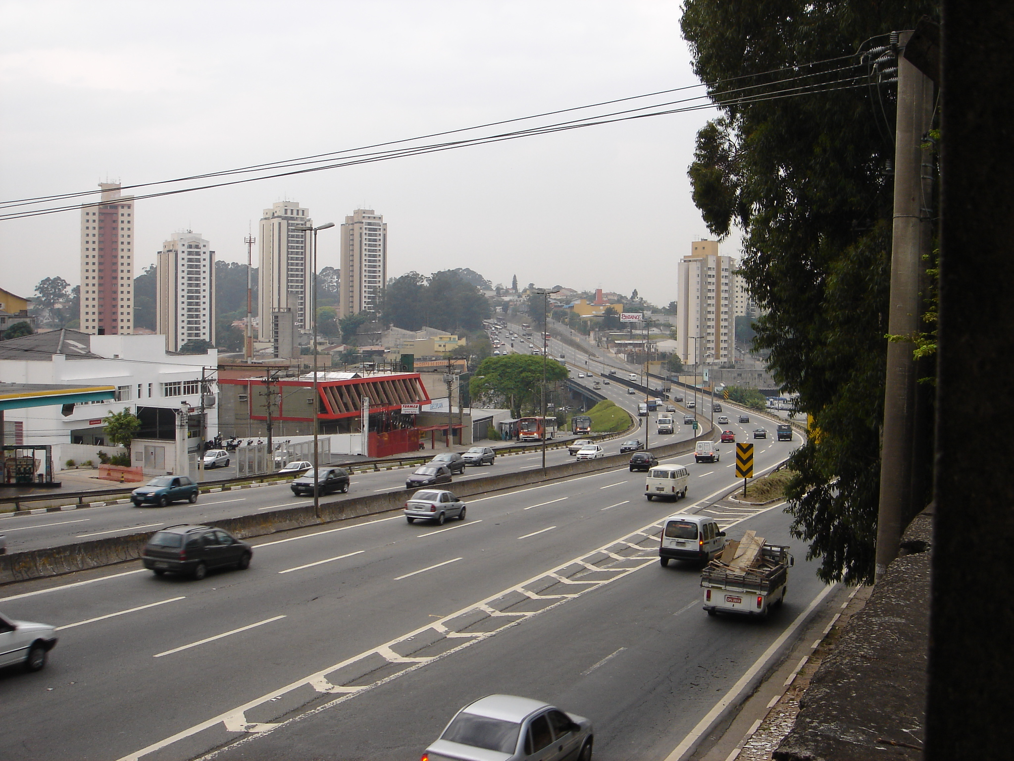 Rodovia Raposo Tavares no km 14, na saída p/ Av. Fco. Morato